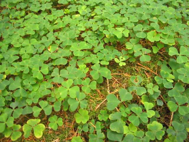 Sauerklee - ohne Blüte